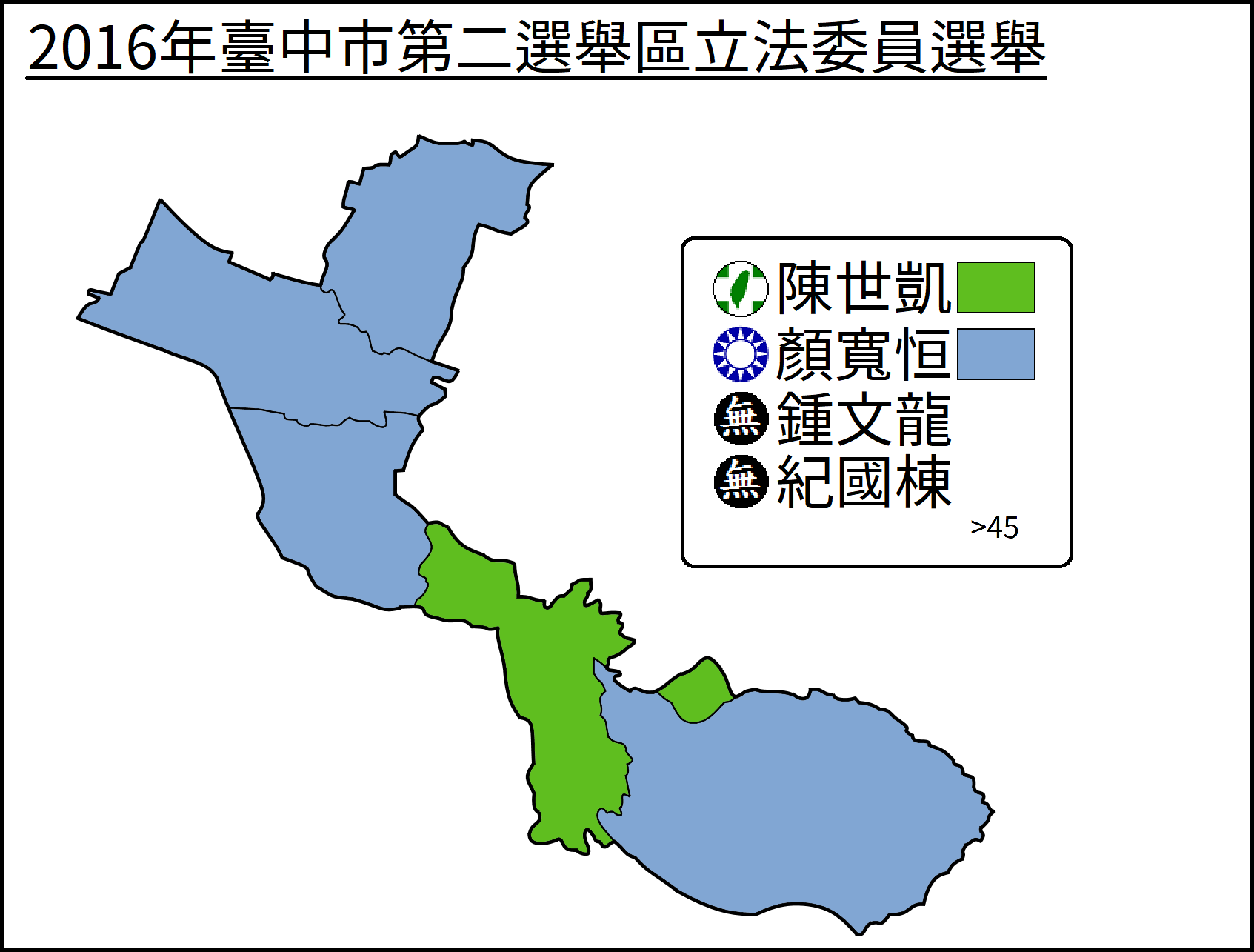 2016年立法委員選舉臺中市第二選舉區